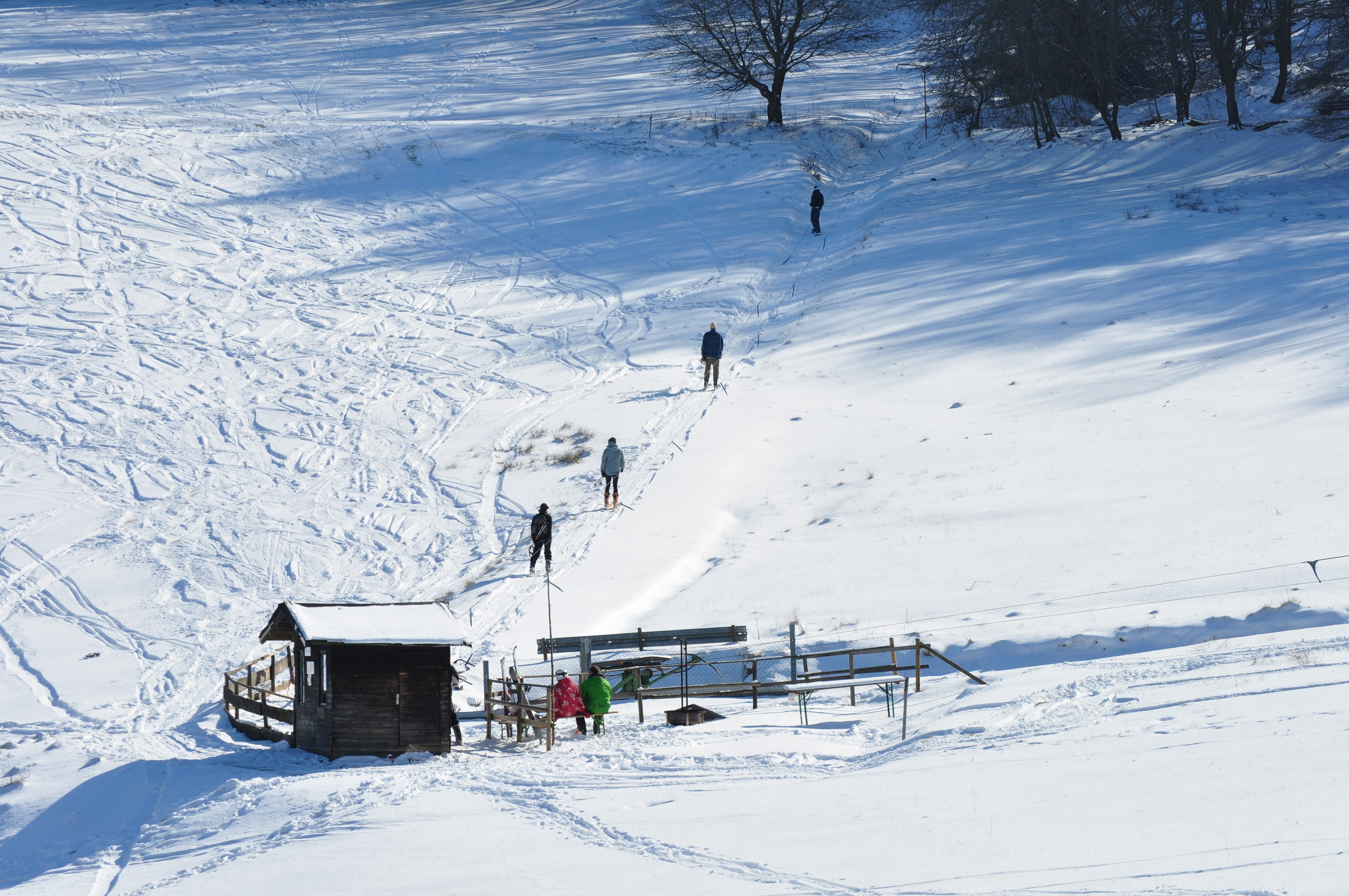 Sikilift in Treisberg